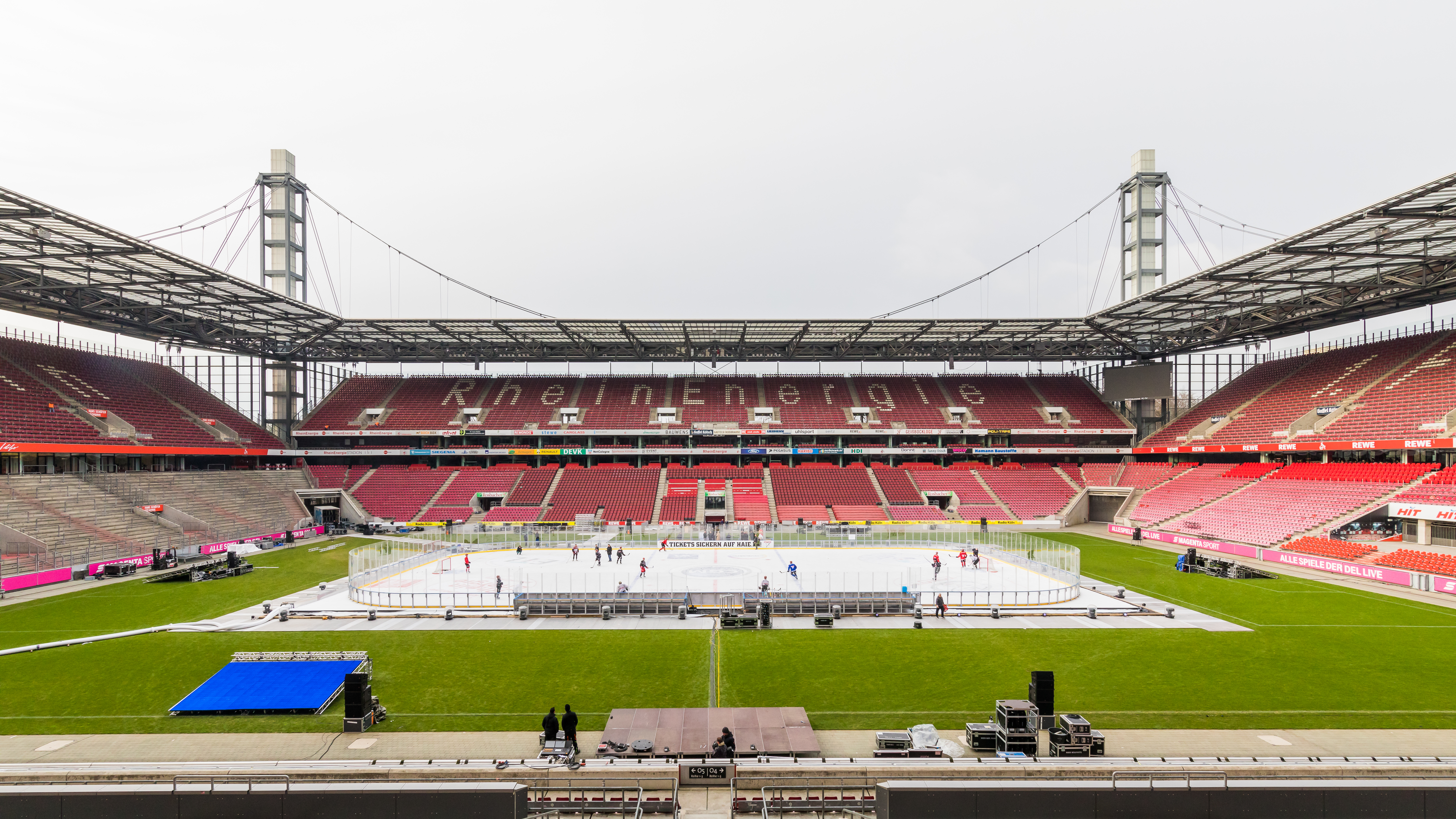 Training der Kölner Haie für das DEL Winter Game 2019 im Rheinenergiestadion Köln